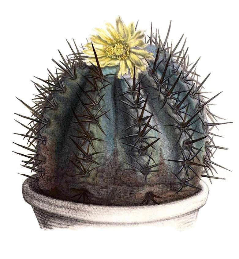 Copiapoa bridgesii (= Copiapoa echinoides)